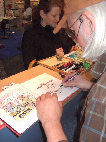 Harm Bengen über die Schulter geschaut Aufnahme: 12.10.2007 Url